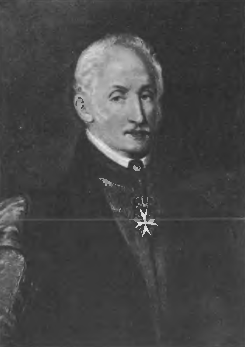 Grafika z książki PL "Adam Fischer - Ossolineum" (1917)